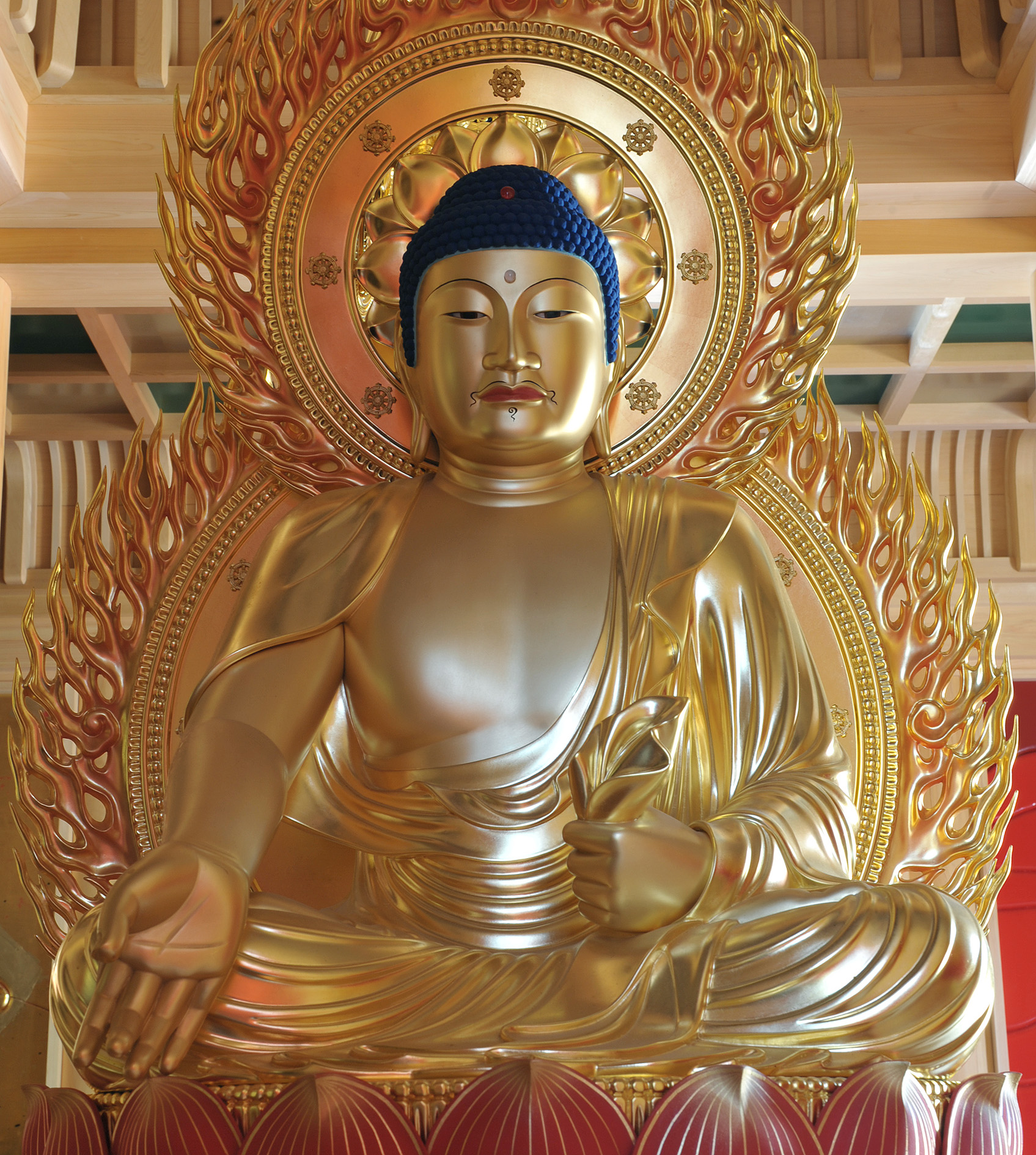 2018年5月12日に落成した蓮華院多宝塔に祀られる宝生如来（五智如来の一体）。毎年1月13日・4月29日・6月13日にご開帳。